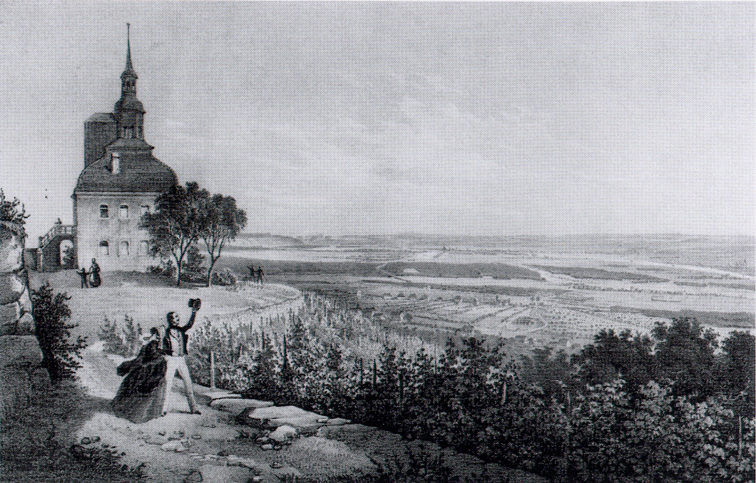 Radebeul, Spitzhaus von der Westseite aus mit Blick in das Elbtal, Stich Anfang 19. Jahrhundert